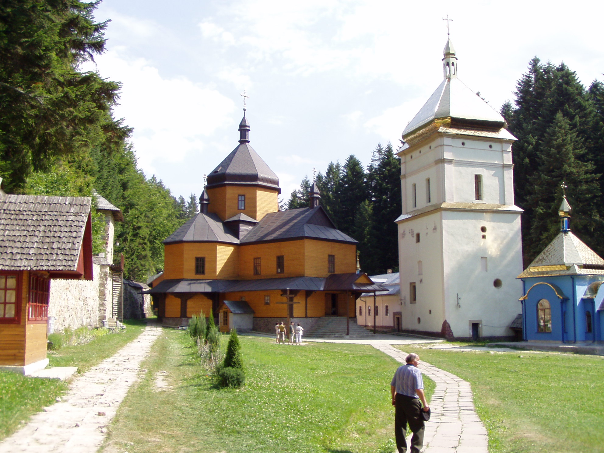 Dziedziniec skitu.